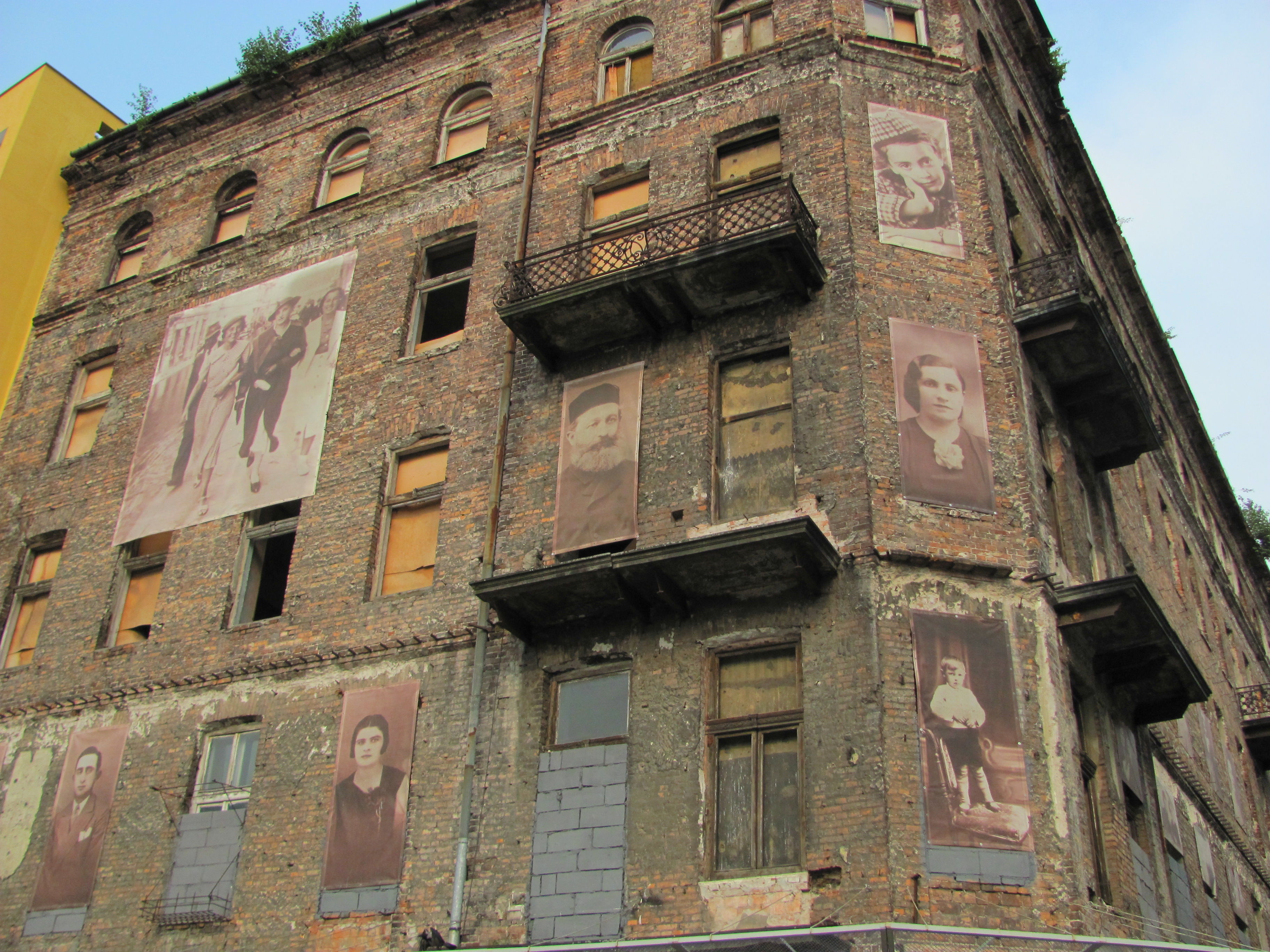 Esquina en la zona donde se encontraba el Gueto de Varsovia. últimos edificios que no fueron restaurados después de la II guerra mundial en la capital de Polonia.